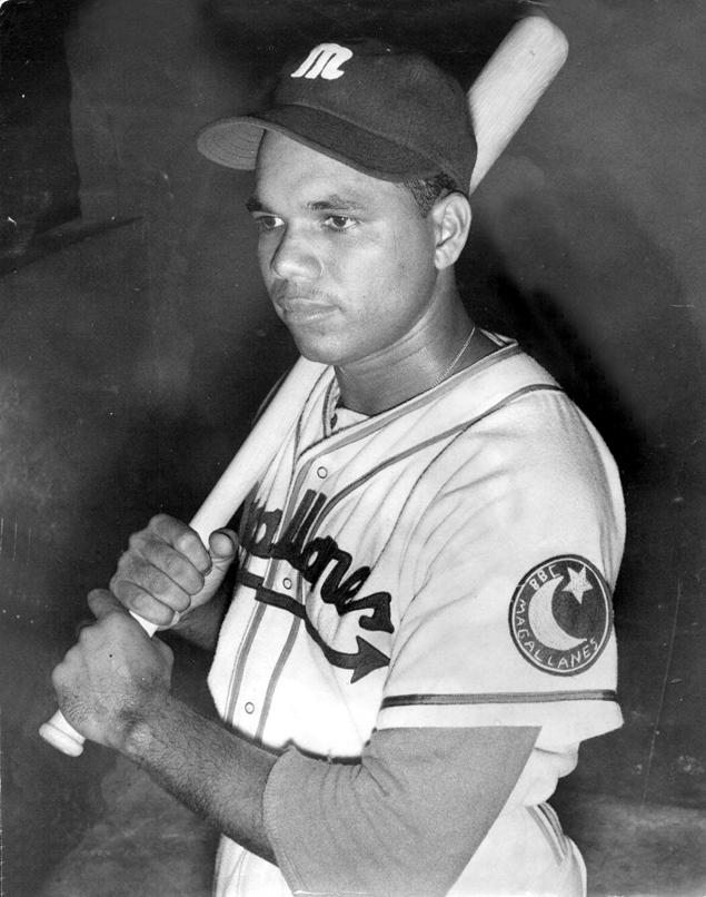 Luis "Camaleón" García con el uniforme del Magallanes.